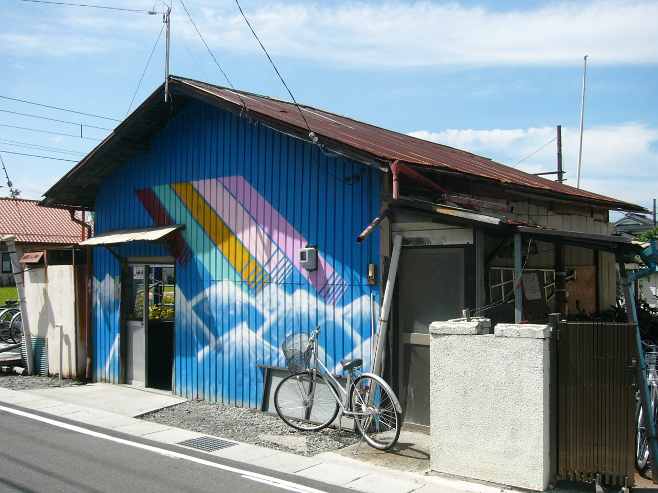 Oniwa Station